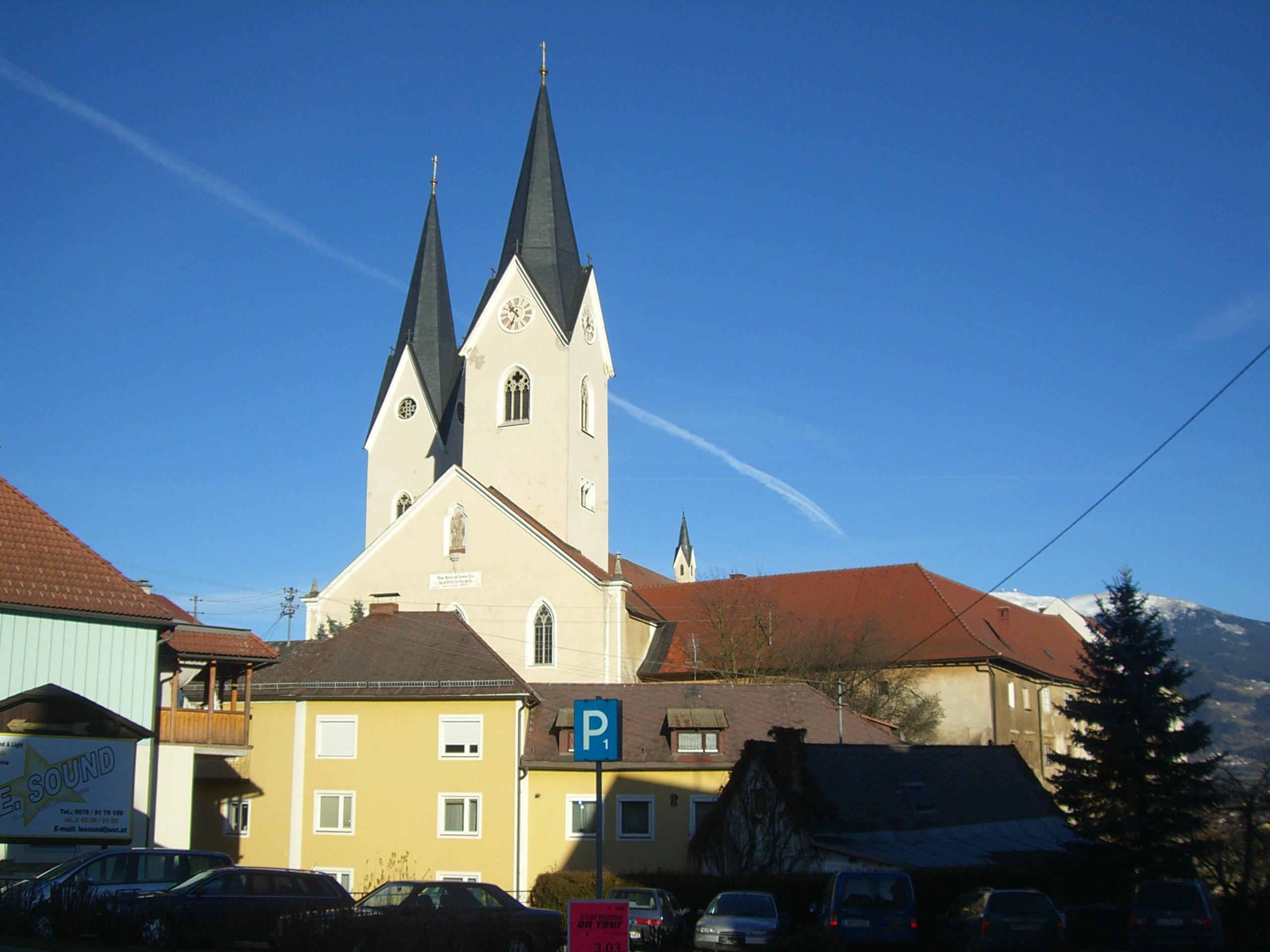 Ostansicht der Pfarrkirche St. Andrä im Lavanttal